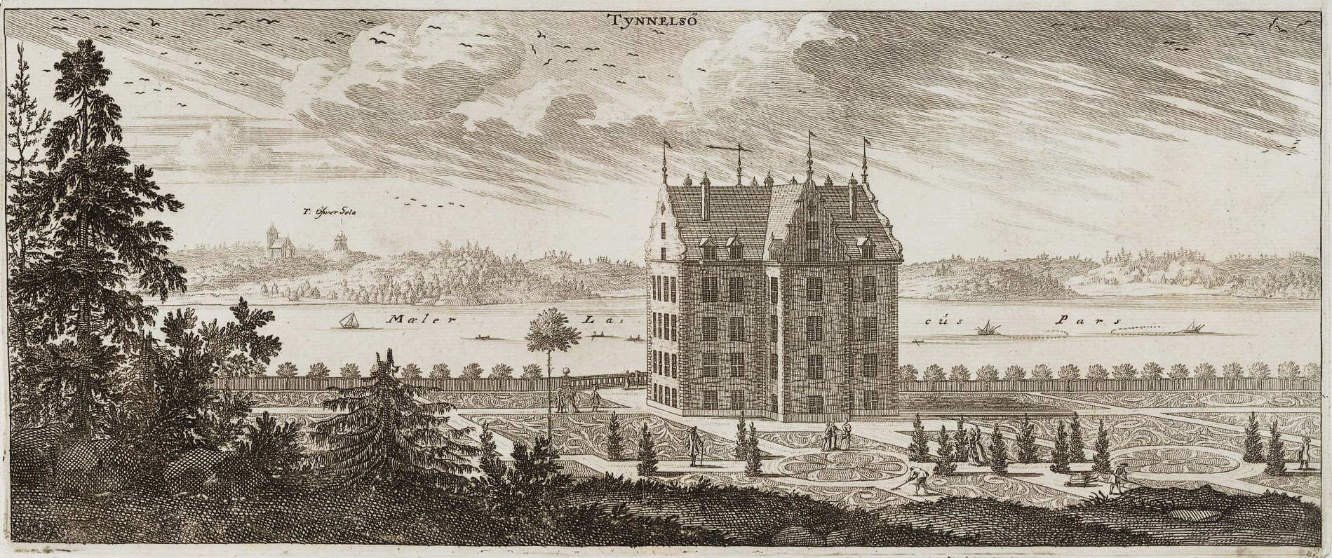 Tynnelsö. Graverad 1696 enl. Erik Vennberg.